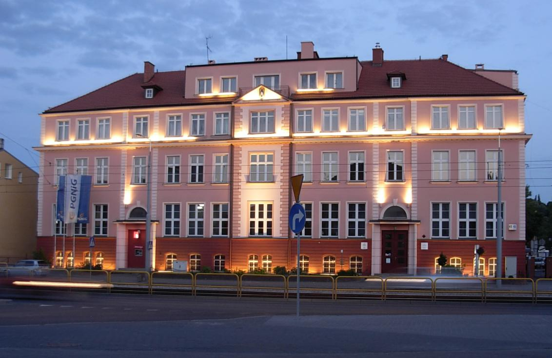 Budynek administracyjny gazowni w Bydgoszczy